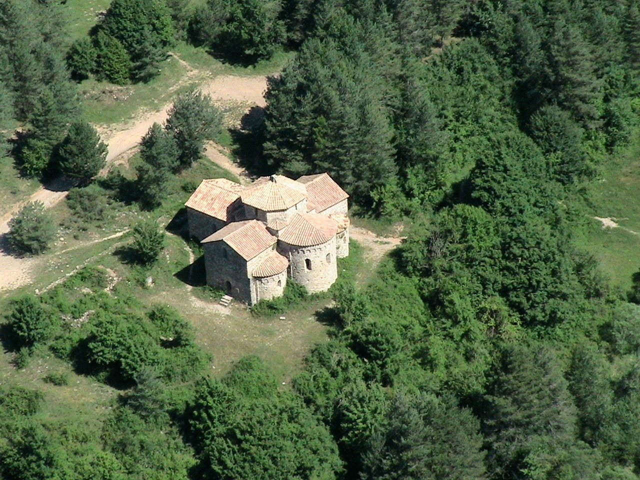 Monestir de Sant Pere de Graudescales (Navès): vista des de la Muntanya de Taravil